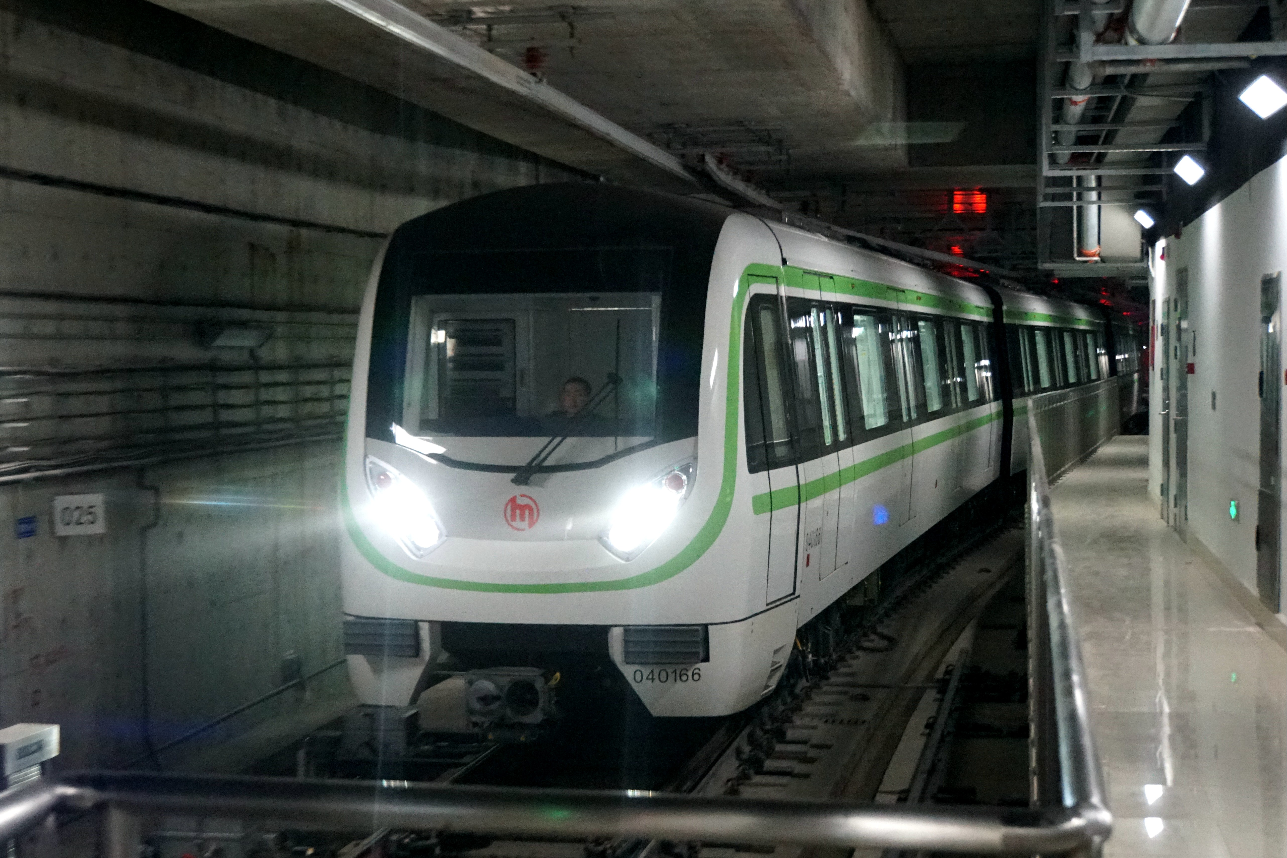 杭州地铁4号线列车正进入浦沿站